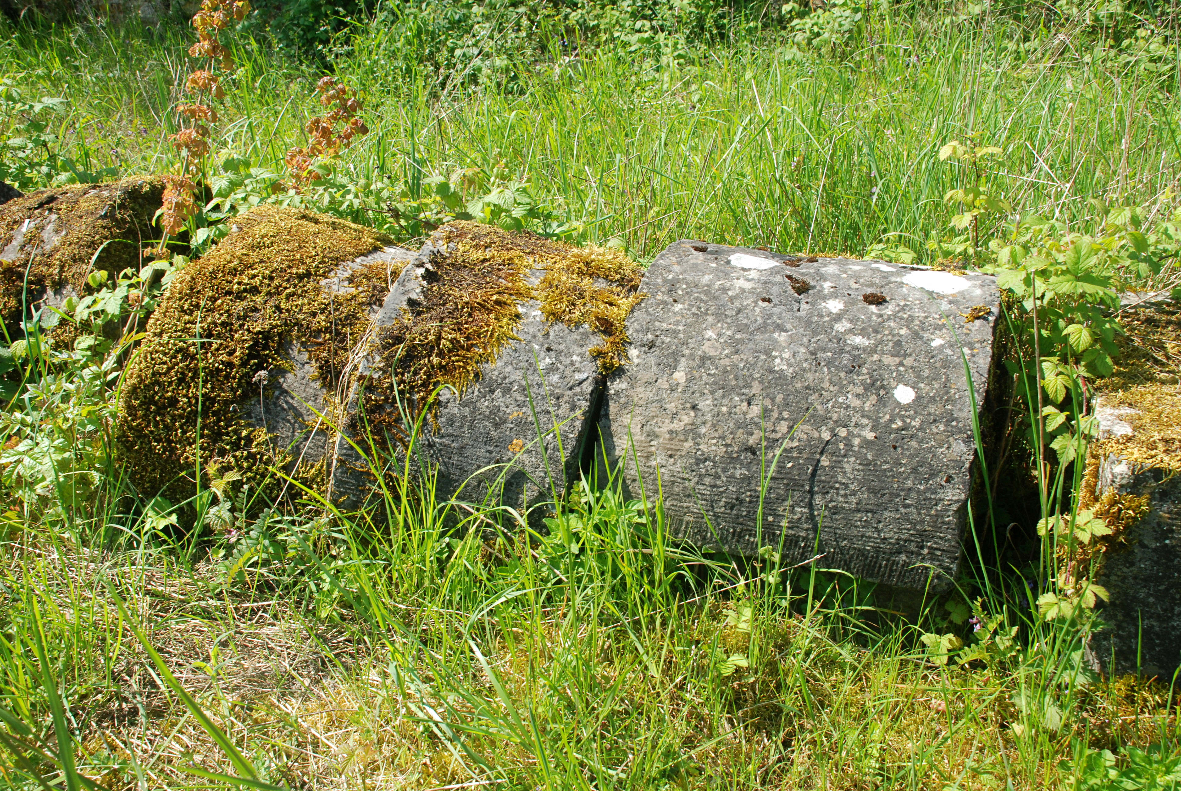 Belgique - Province de Namur - Viroinval - Nismes - Ancienne église Saint-Lambert (1606)